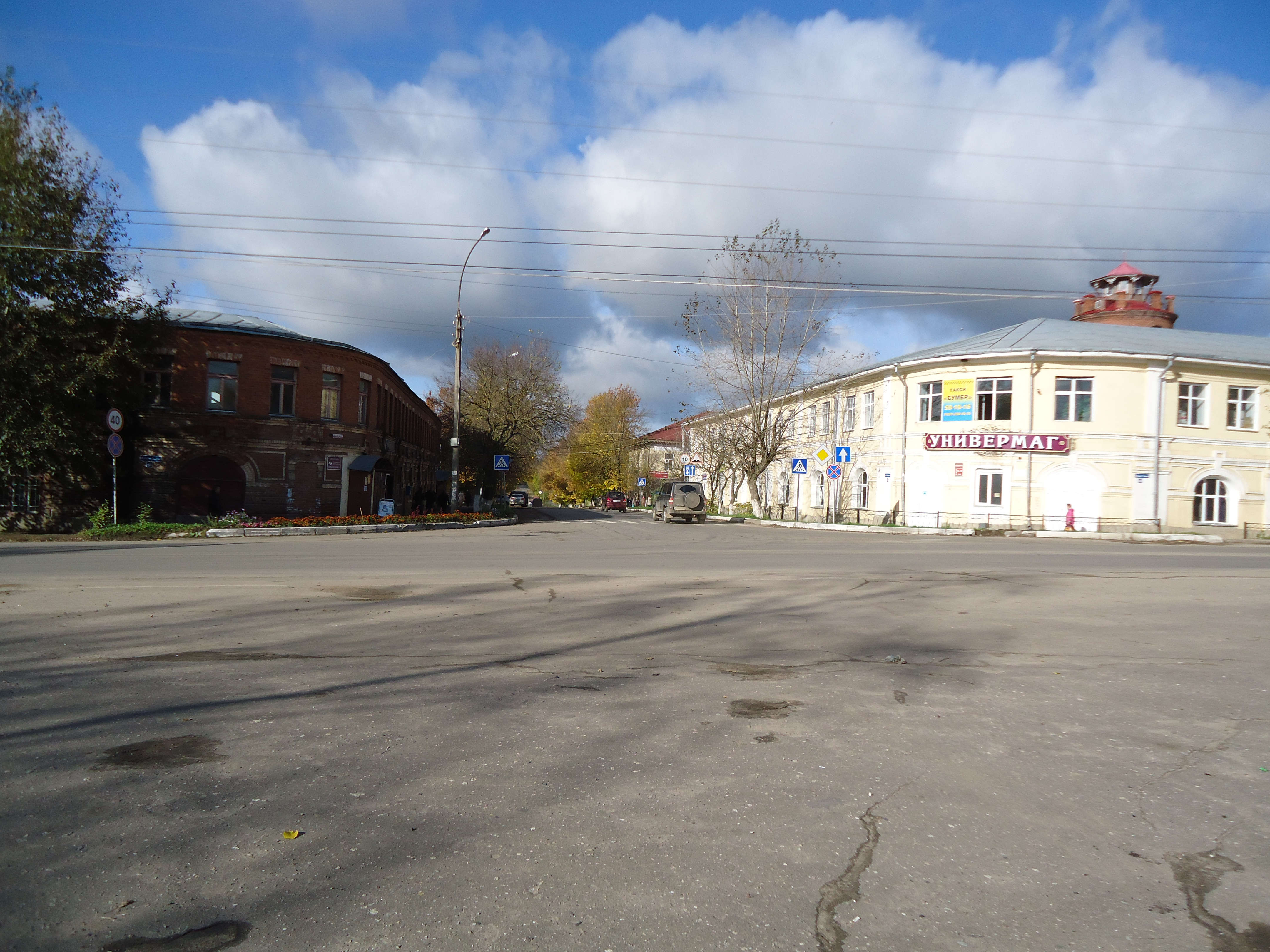 Центральная площадь - пересечение улиц Ленина и Карла Маркса. На фото четыре памятника: 1) северные торговые ряды (желтое); 2) южные торговые ряды (красное слева); 3) Гостиница Иллювиева (здание вдали справа - светлый верх, тёмный низ); 4) Водонапорная башня 1916 года (красная за северными торговыми рядами)